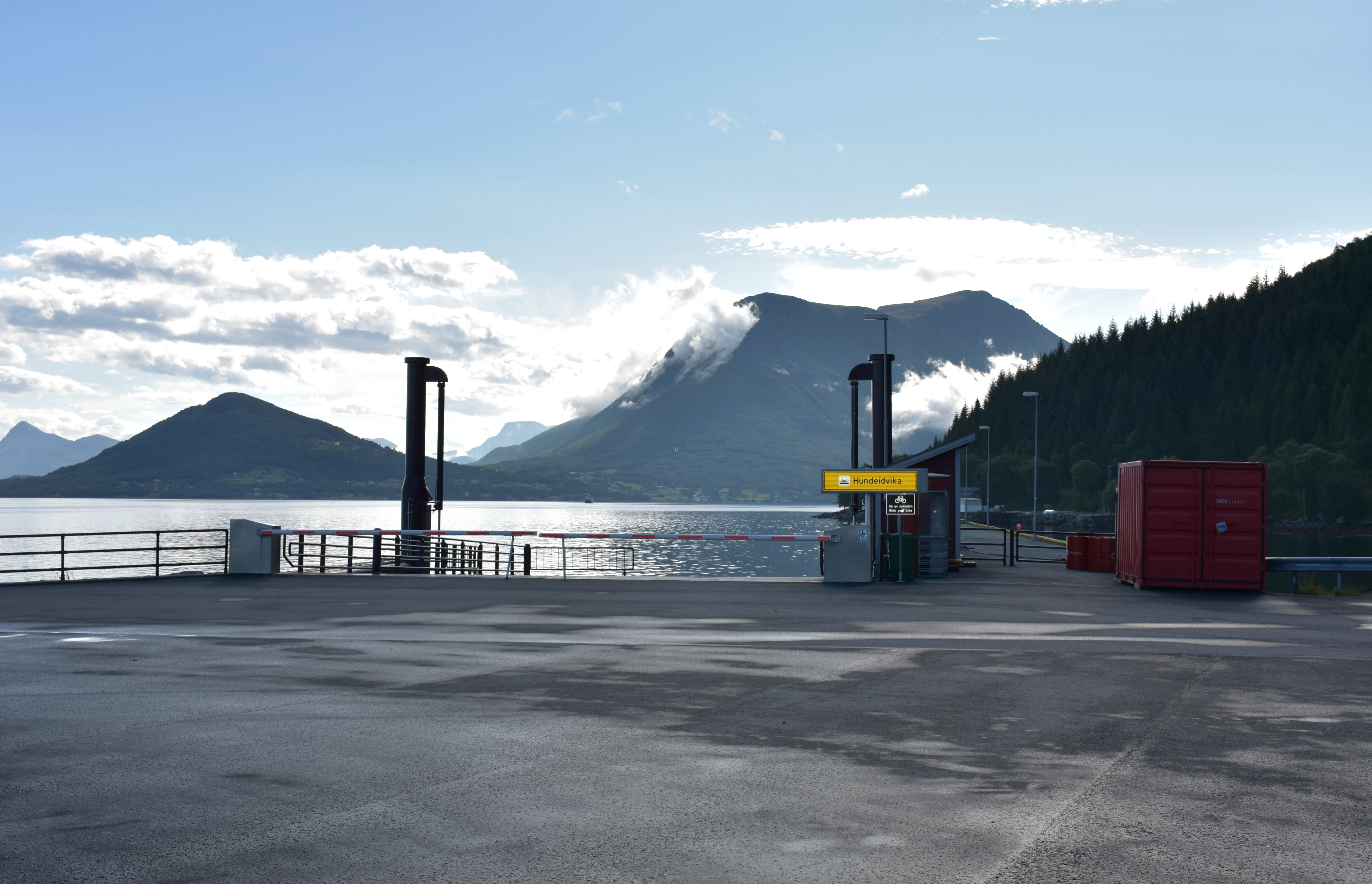 Festøya: Kai for fergen til Hundeidvika